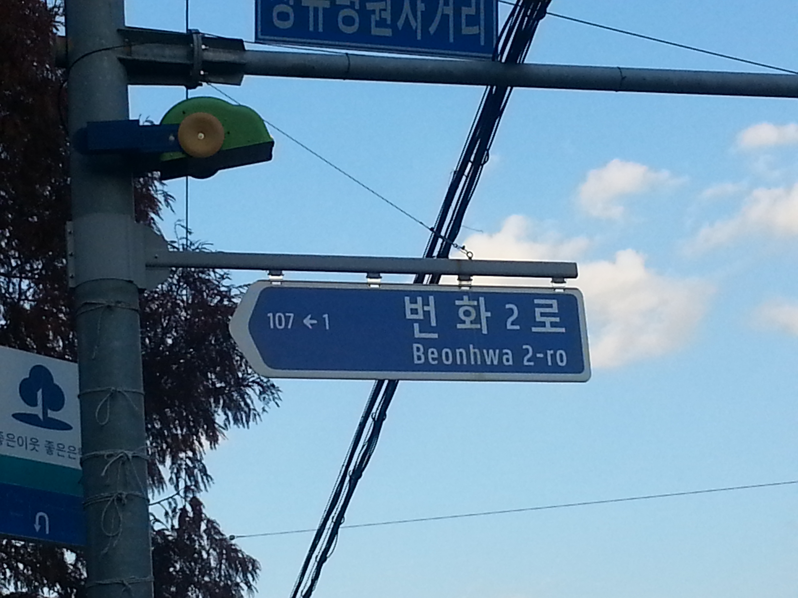 대한민국의 도로명주소 표지판 중 하나. 사진에는 번화2로가 나와 있다.